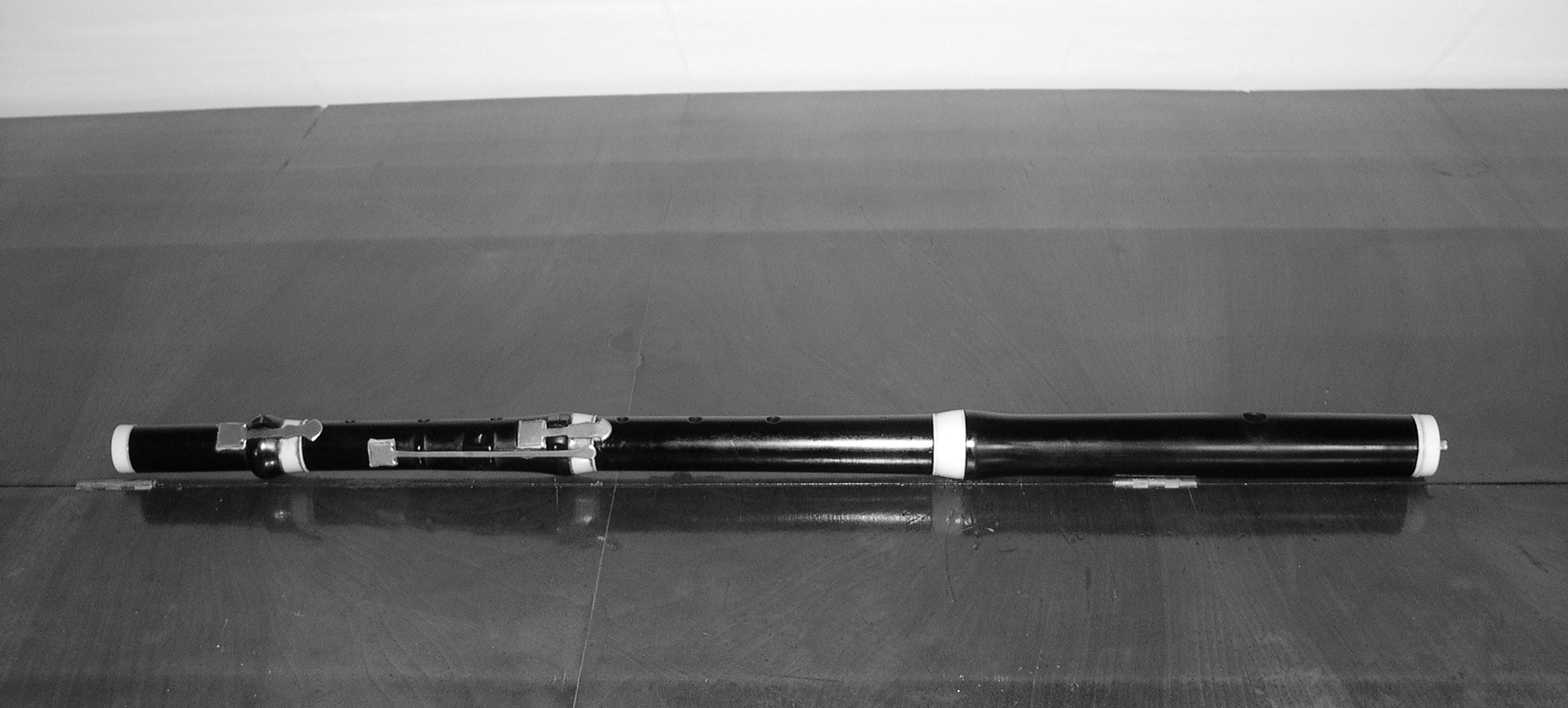 Flûte Johann Friedrich Boie, Göttingen (c.1789) with a long F key to Friedrich ludwig Dülon